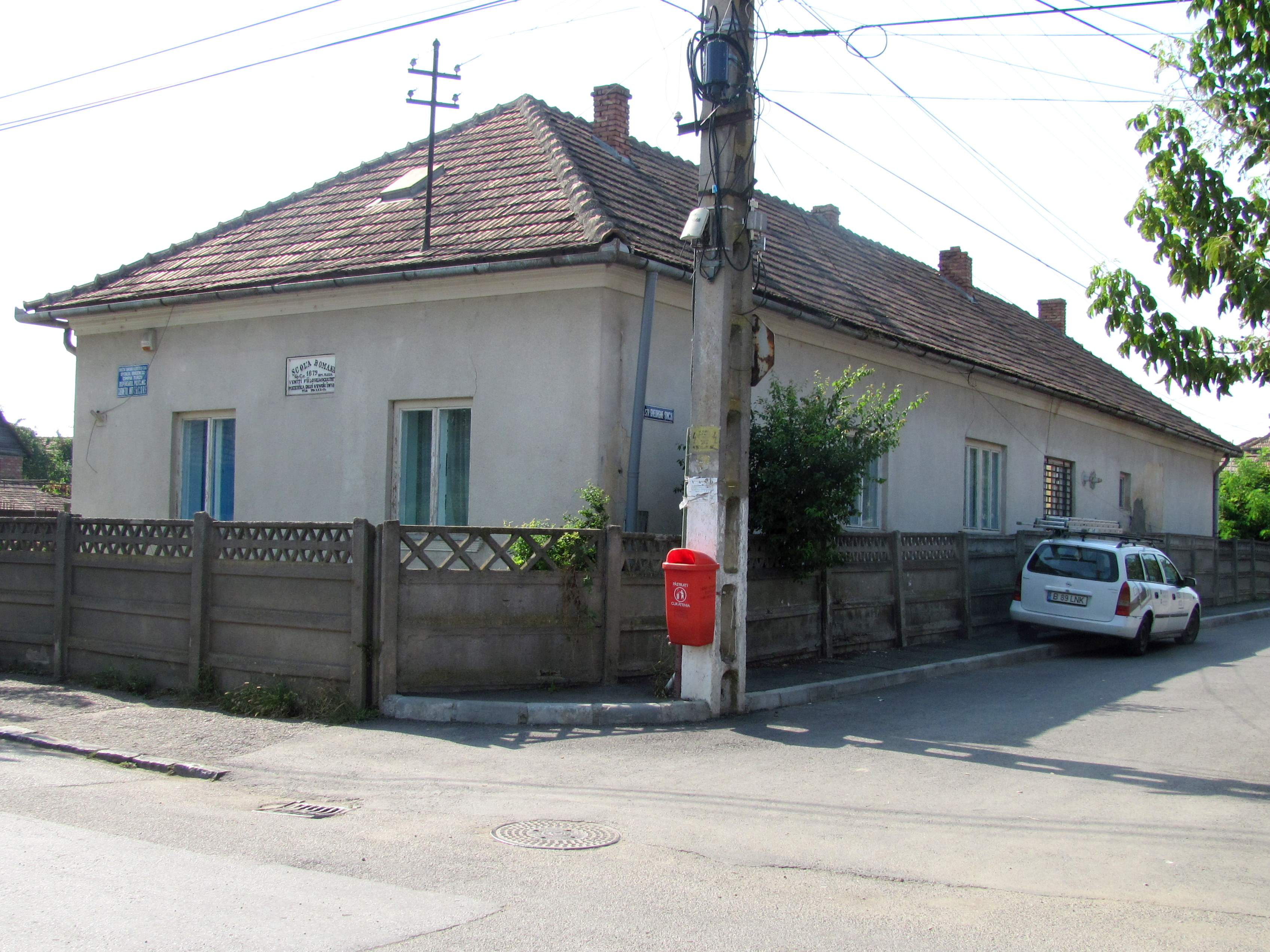 Câmpia Turzii, Str.Avram Iancu nr.8, Dispensarul Anti-TBC al Policlinicii (fosta prima școala românească din Câmpia Turzii)